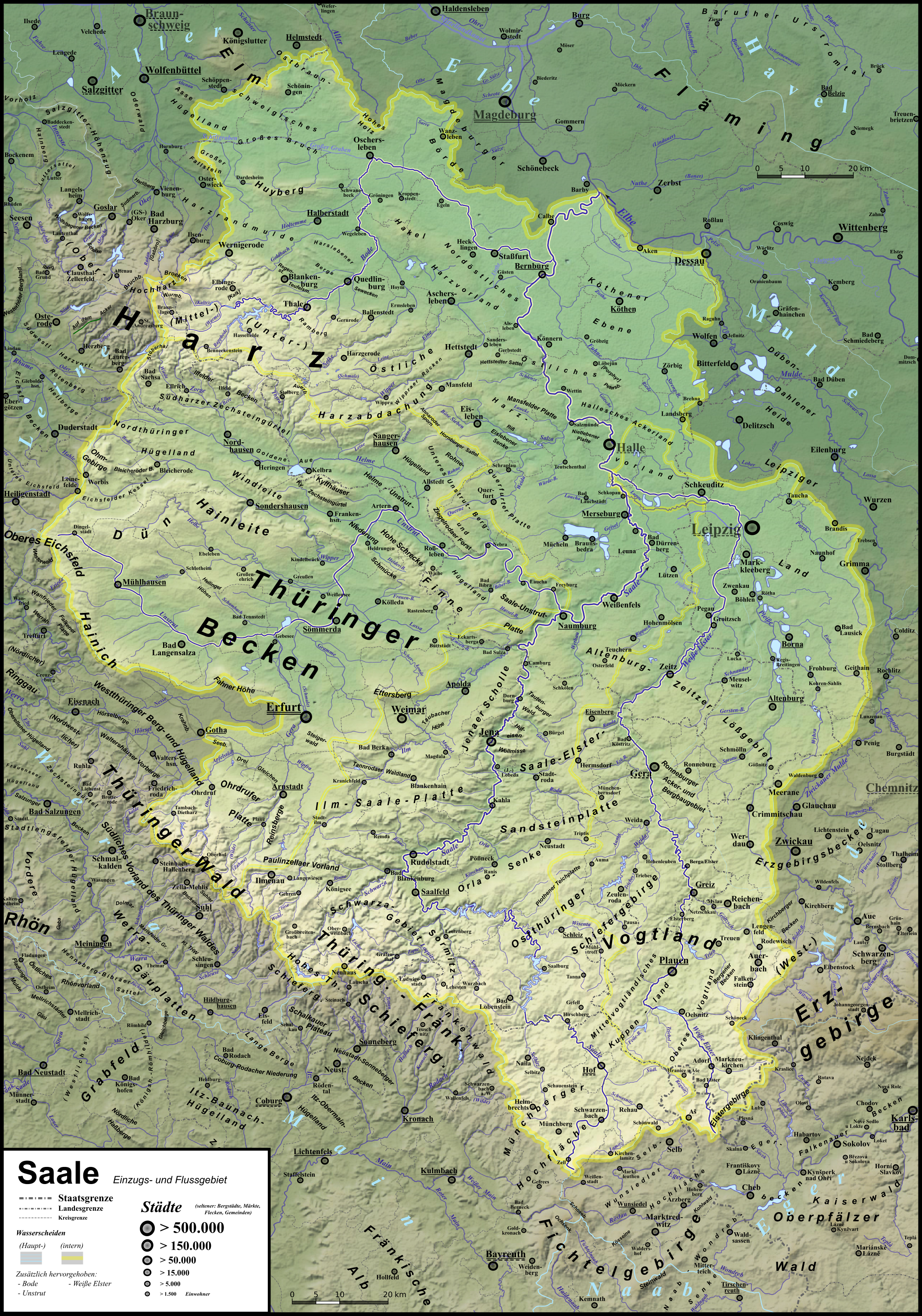 Einzugs- und Flussgebietskarte der Saale und ihrer wichtigsten Nebenflüsse Unstrut, Weiße Elster und Bode mit naturräumlichen Einheiten